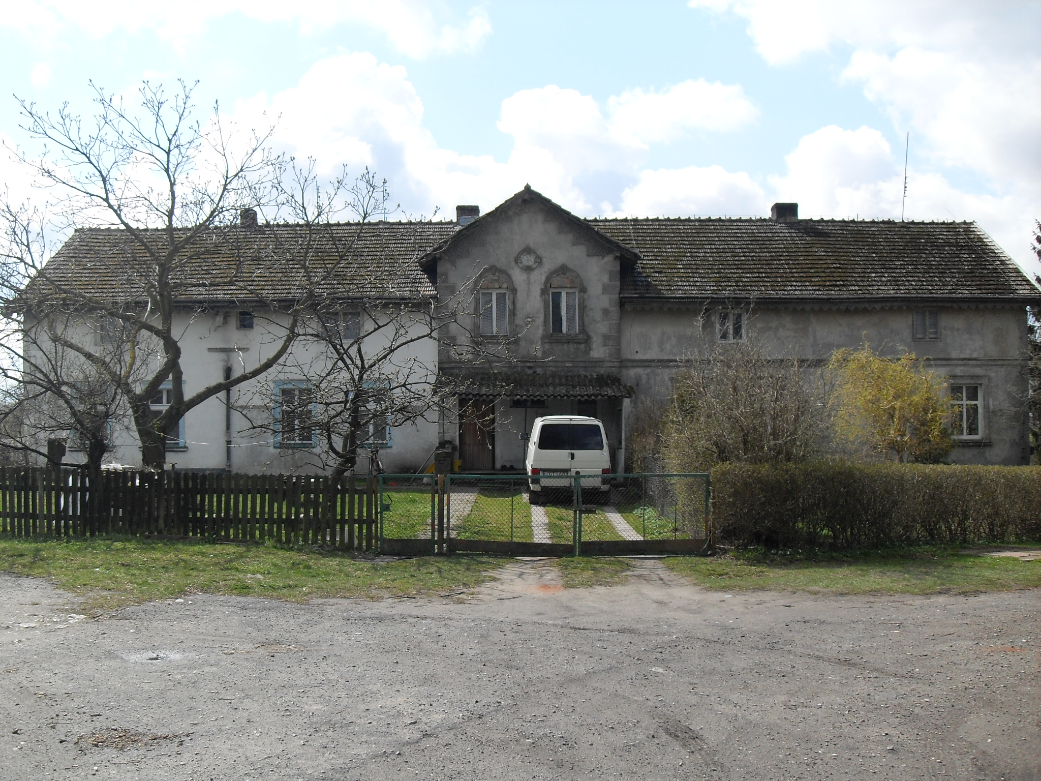 Ehem. Herrenhaus Vorwerk Katharinenhof